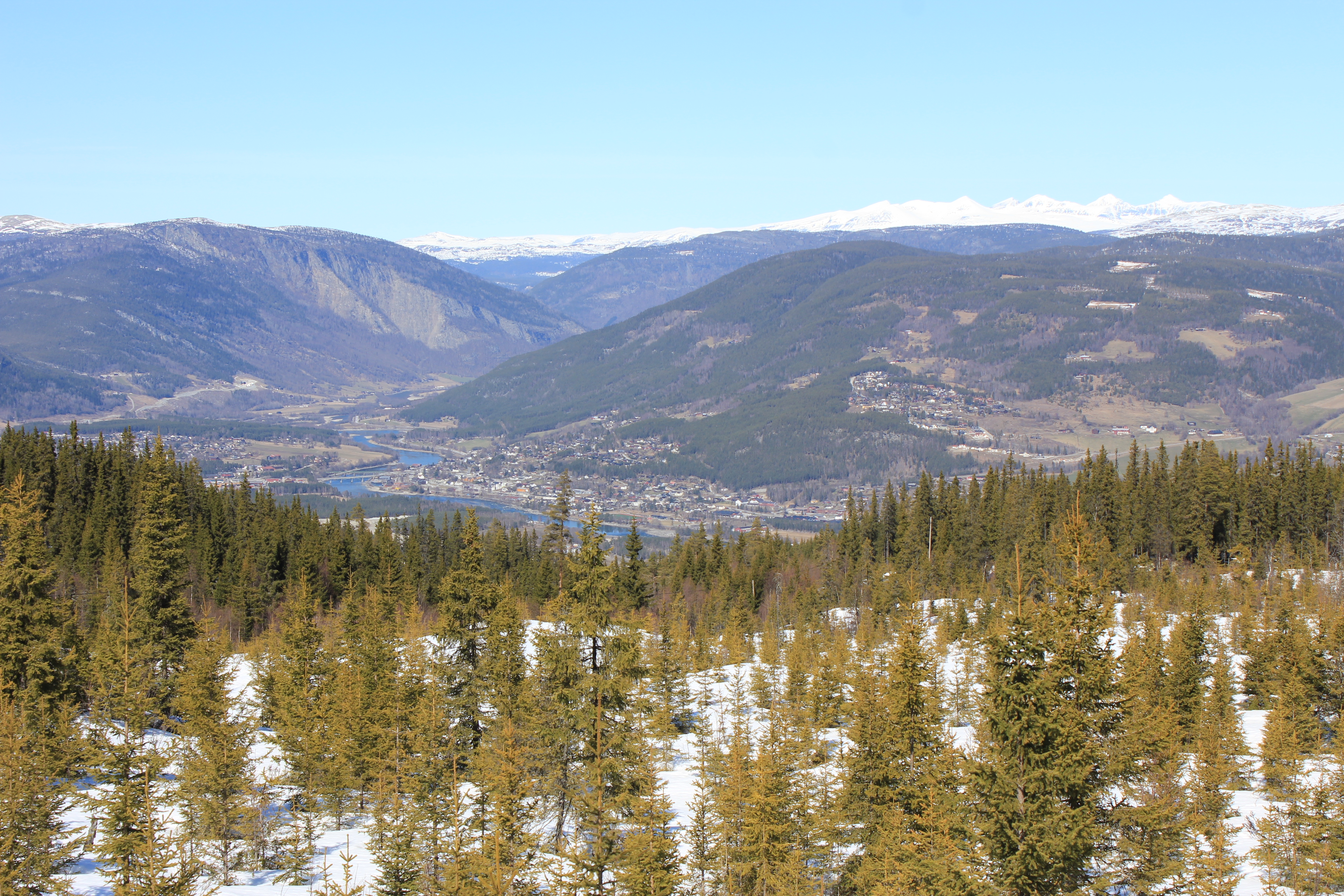 Gudbrandsdalen sett nordover fra vegen opp mot Gålå.